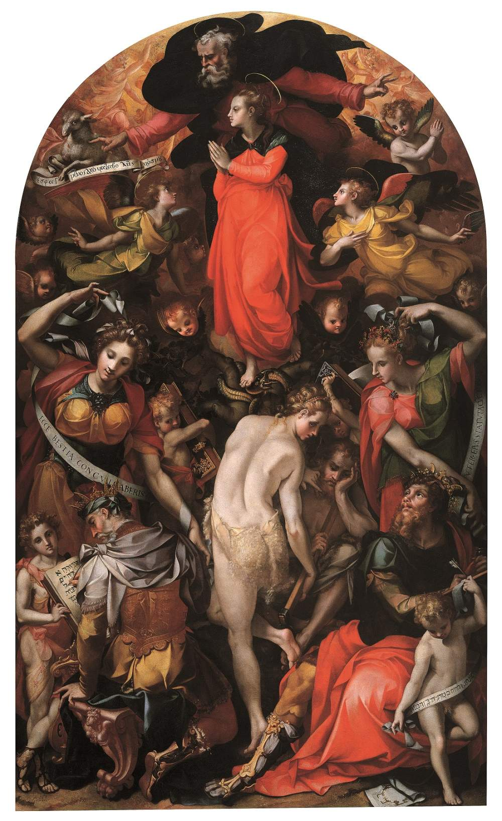 Immaculate Conception